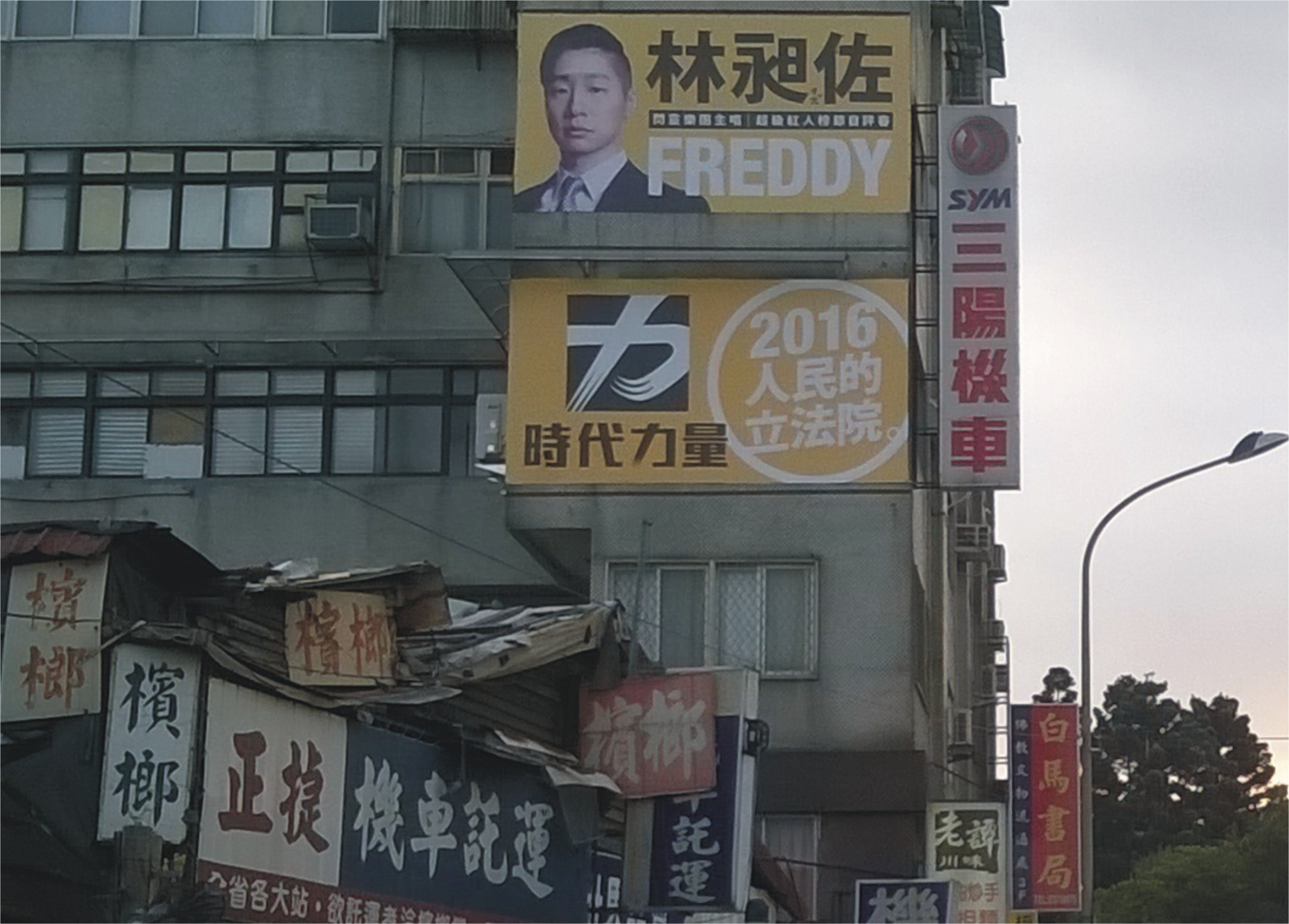 時代力量提名閃靈樂團主唱林昶佐參選2016年中華民國立法委員選舉，位於台北市中正區北平東路台北車站附近之廣告布條。